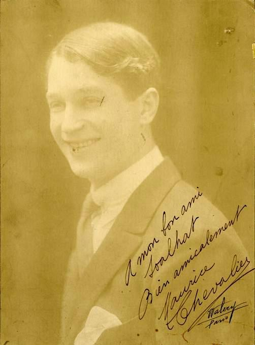 CHEVALIER Maurice [Paris, 1888 - id., 1972], chansonnier français. Photographie de jeunesse dédicacée (cliché aussi signé par le photographe Walery-Paris).